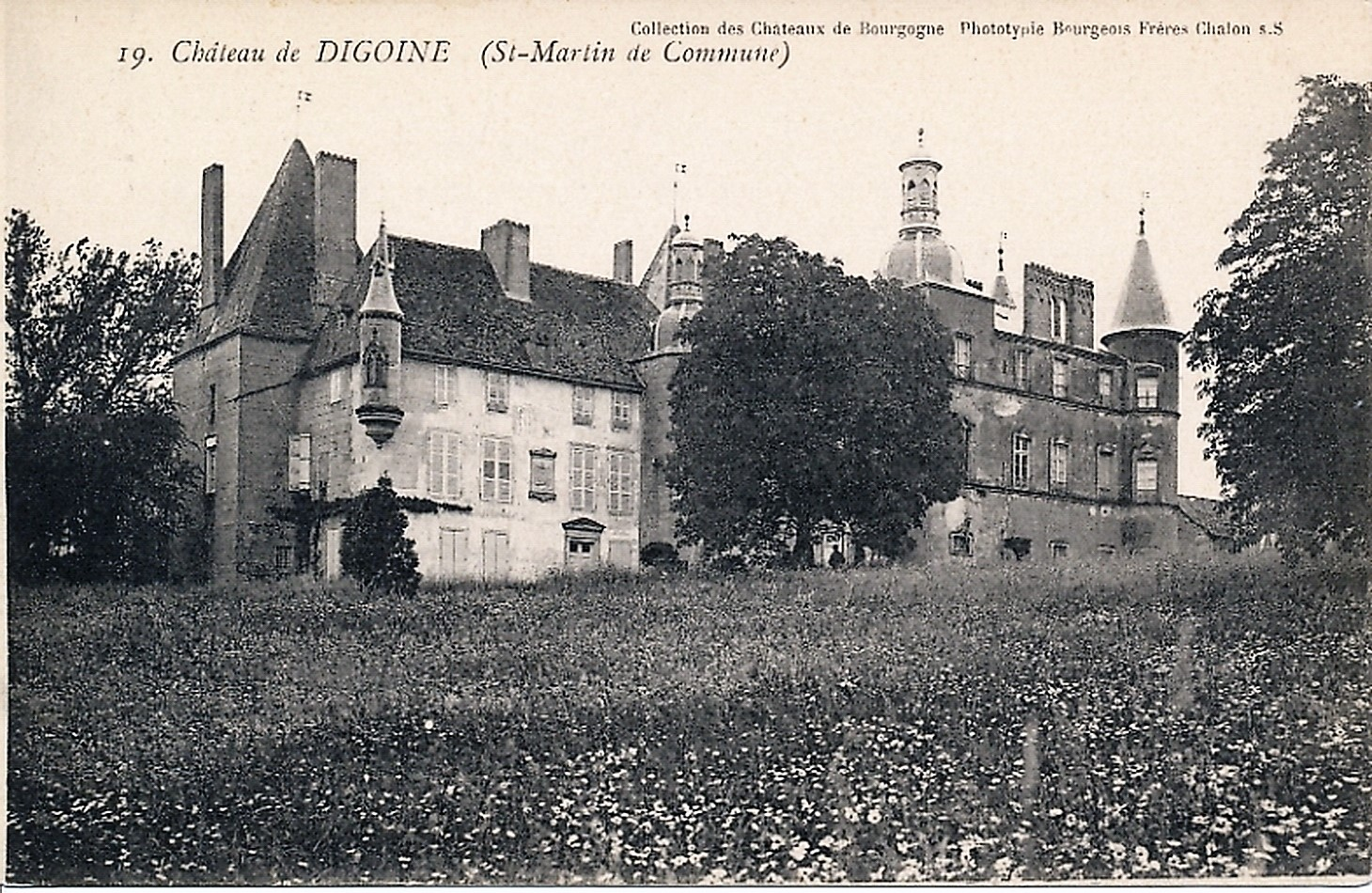 Château de Digoine de Saint-Martin-de-Commune Saône-et-Loire